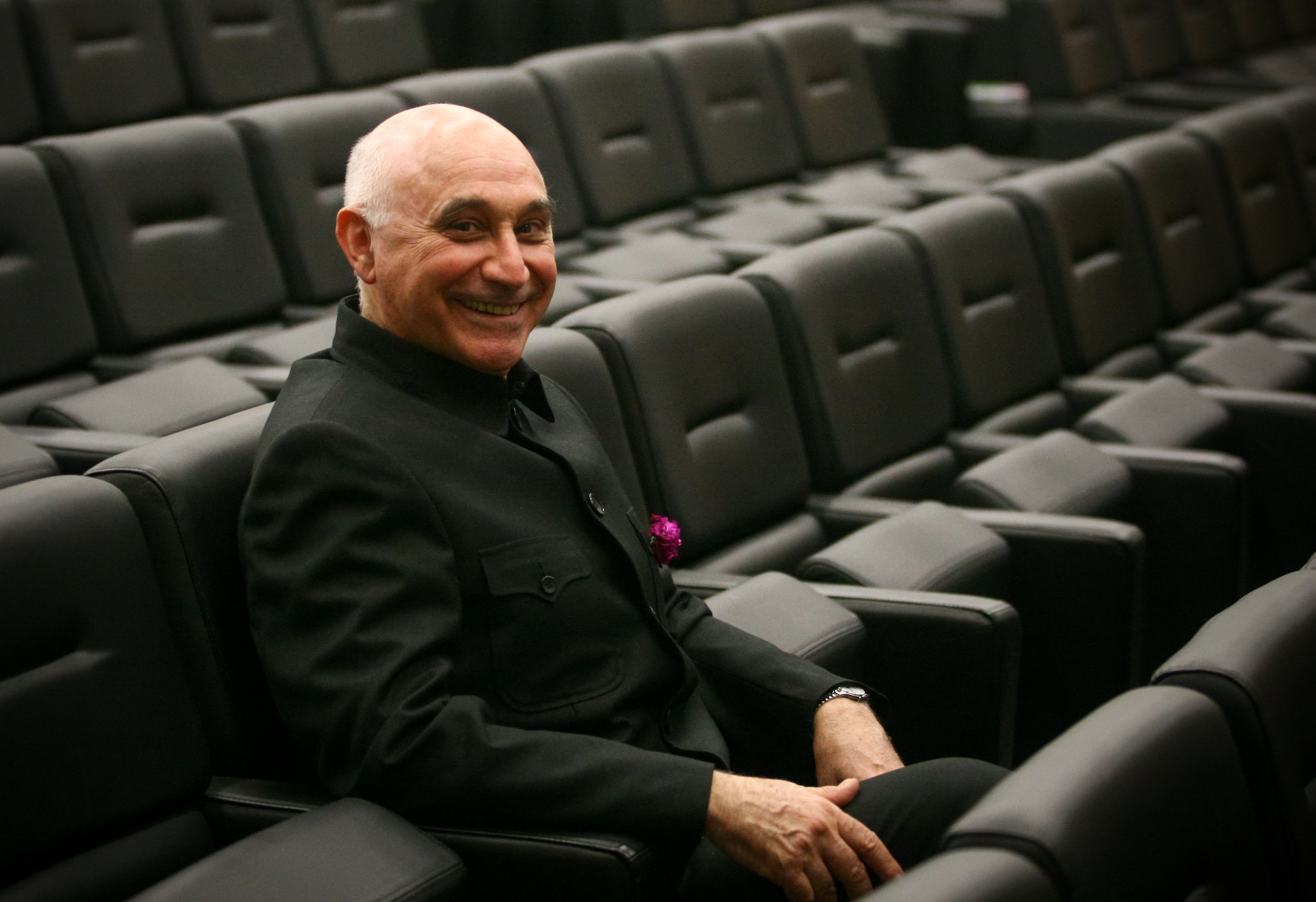 Bruno G. Bara Convegno